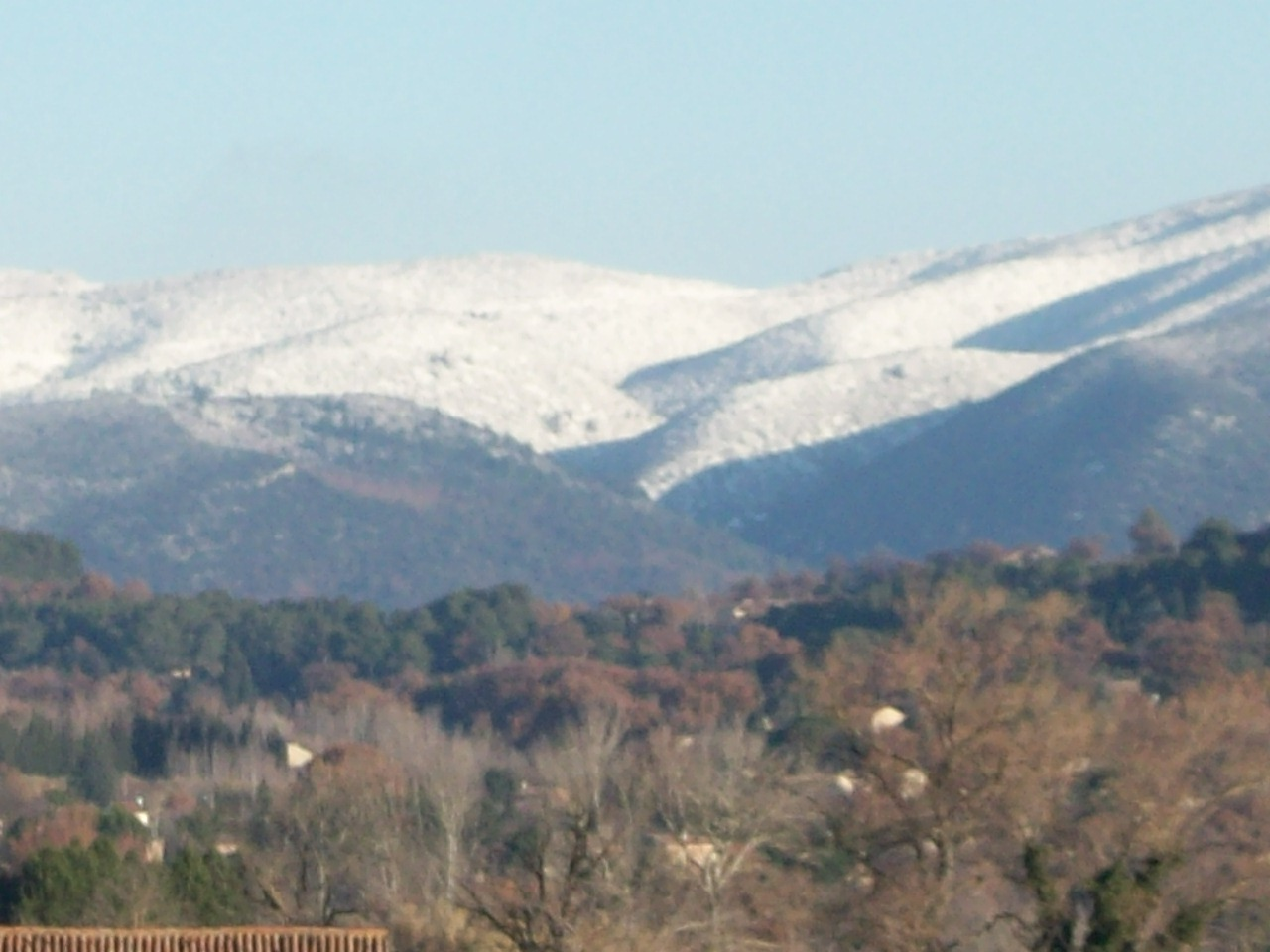 Neige sur le grand luberon